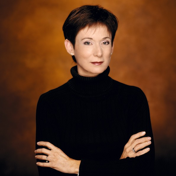 פרופ' סוזי נבות